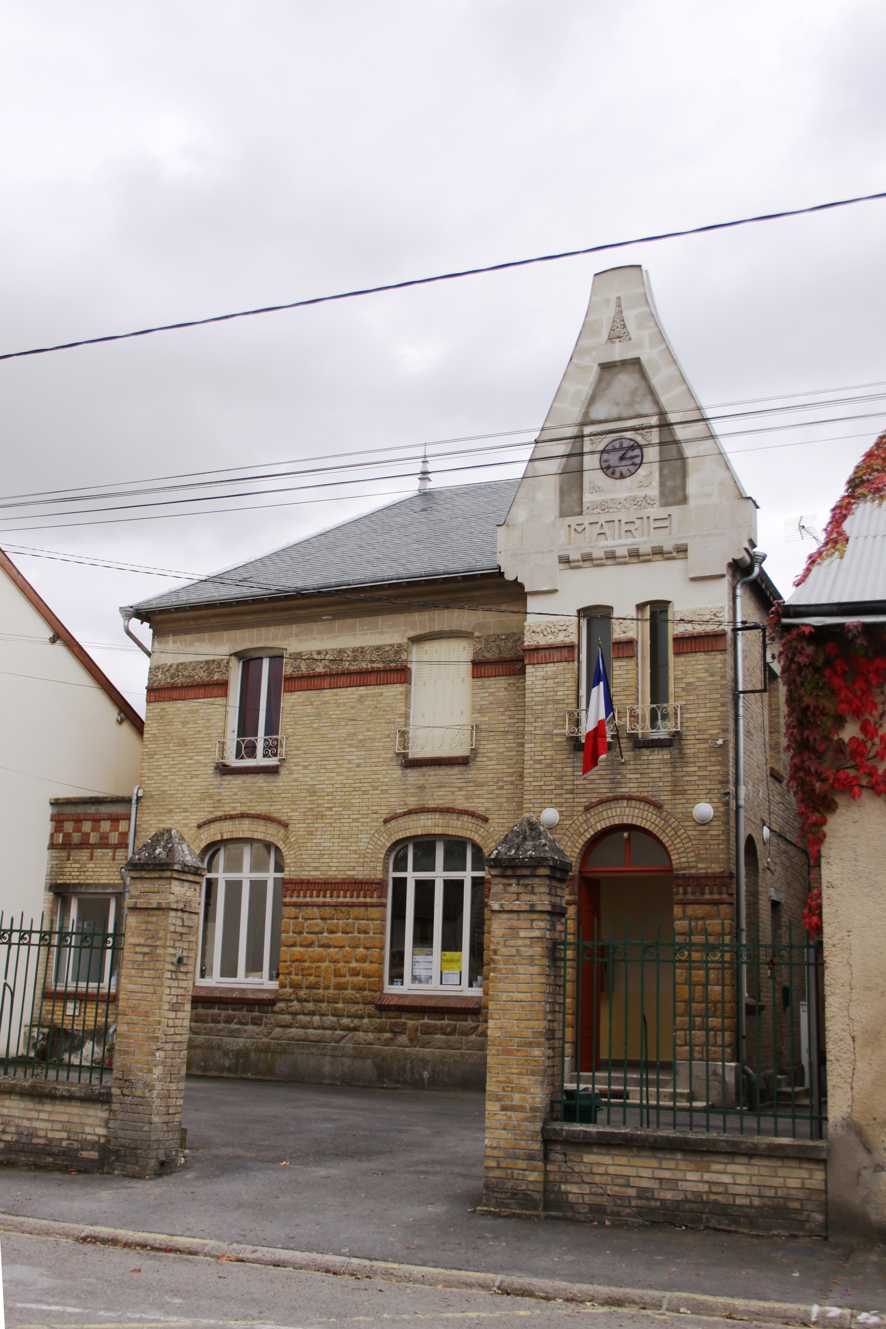 Village Ardennais